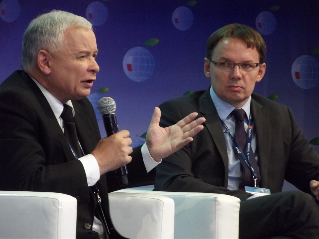 Zdjęcie zrobione podczas XXIII Forum Ekonomicznego w Krynicy-Zdroju.